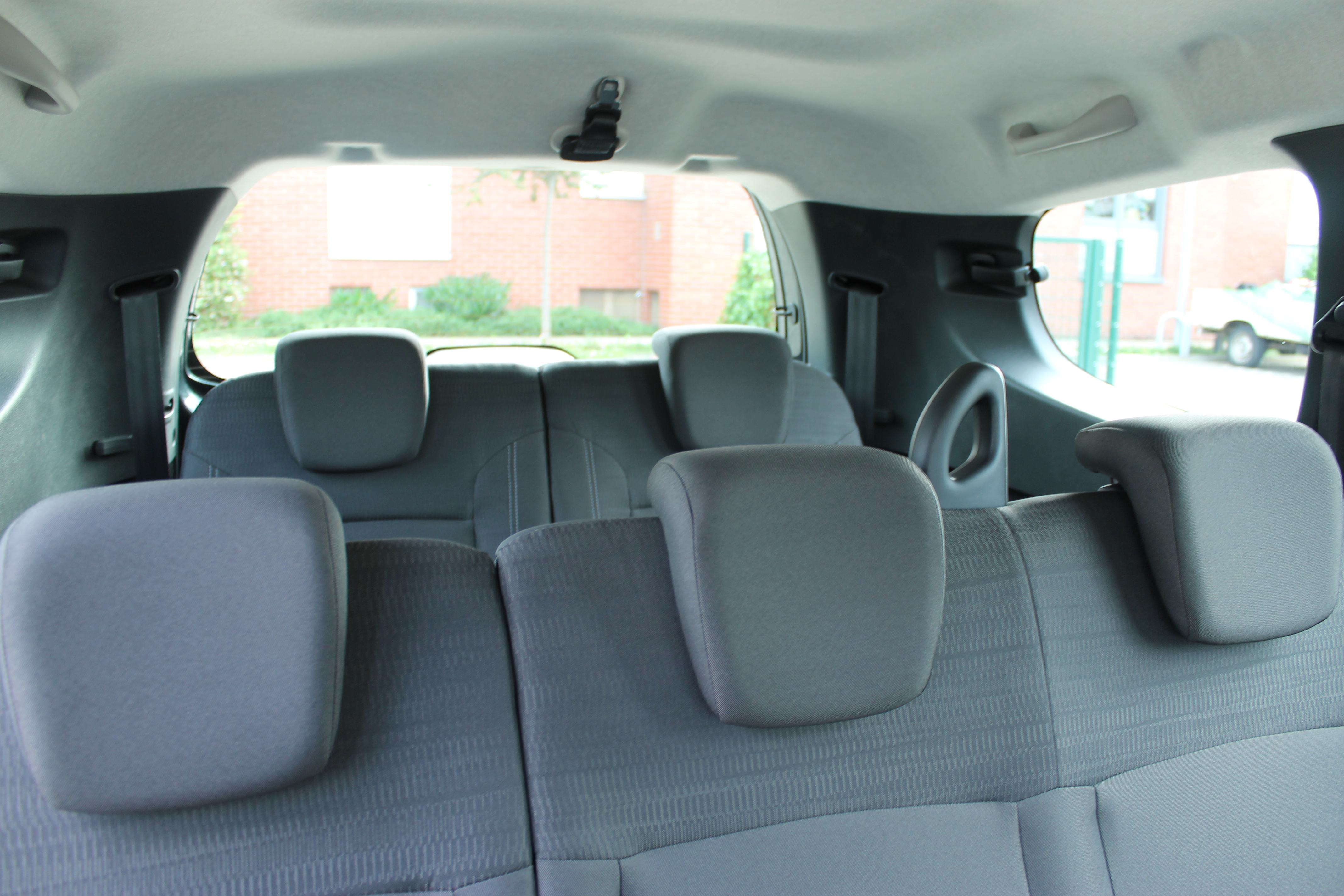 Innenansicht mit dritter Sitzreihe